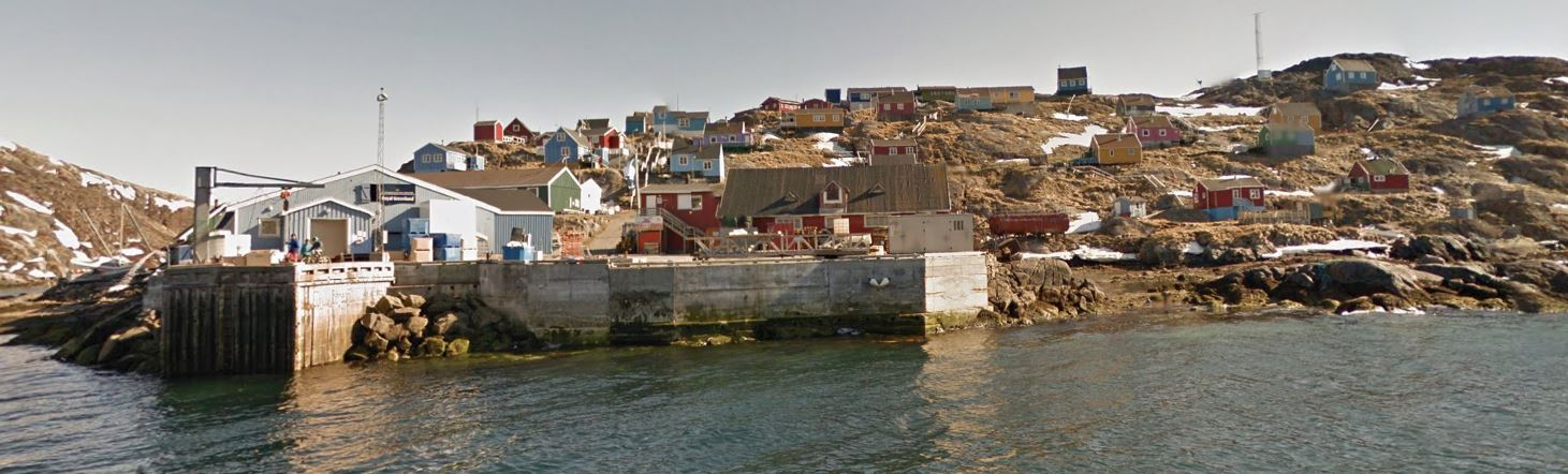 Sarfannguit